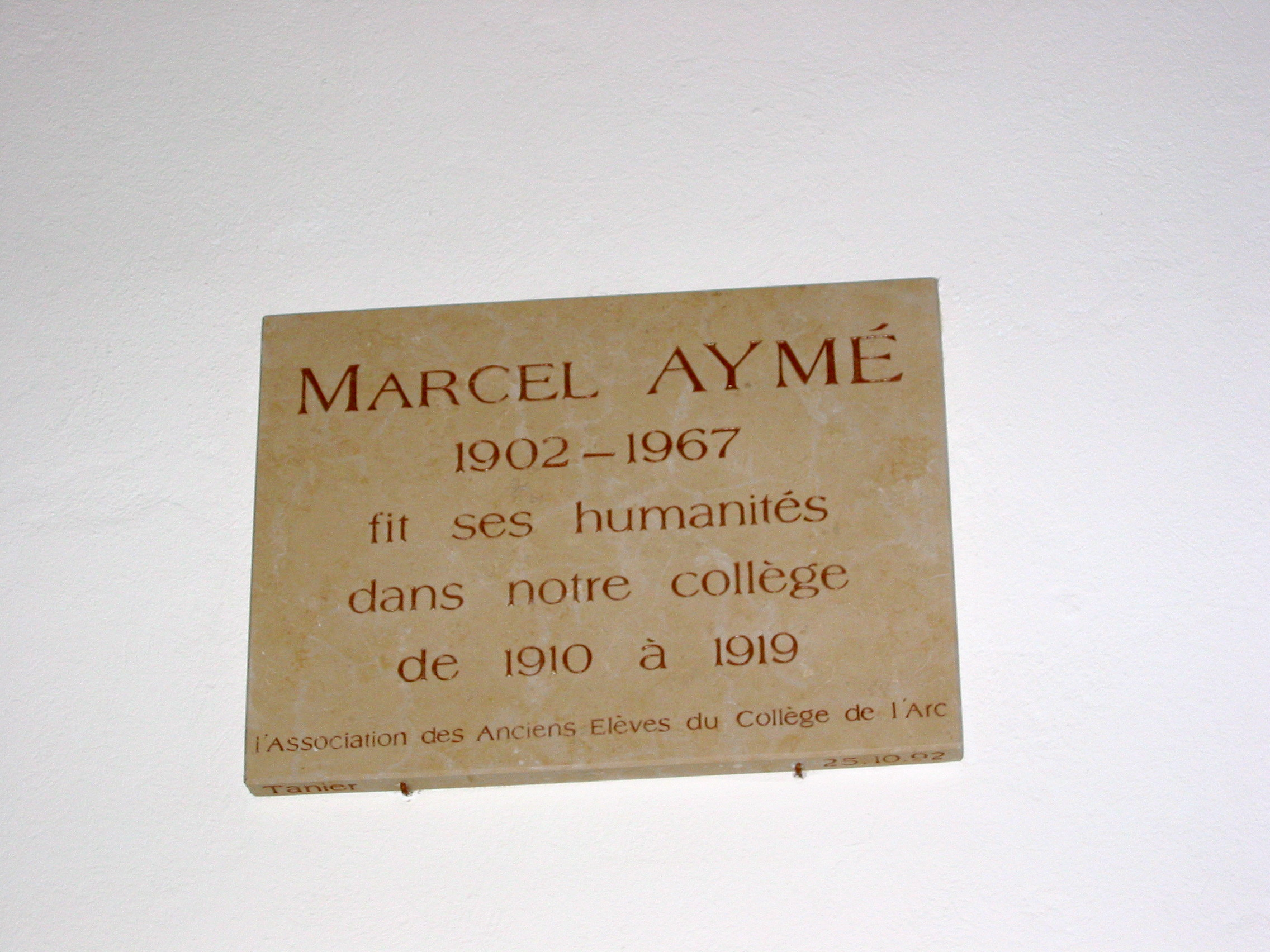 Marcel Aymé écrivain ancien élève du collège de l'Arc à Dole